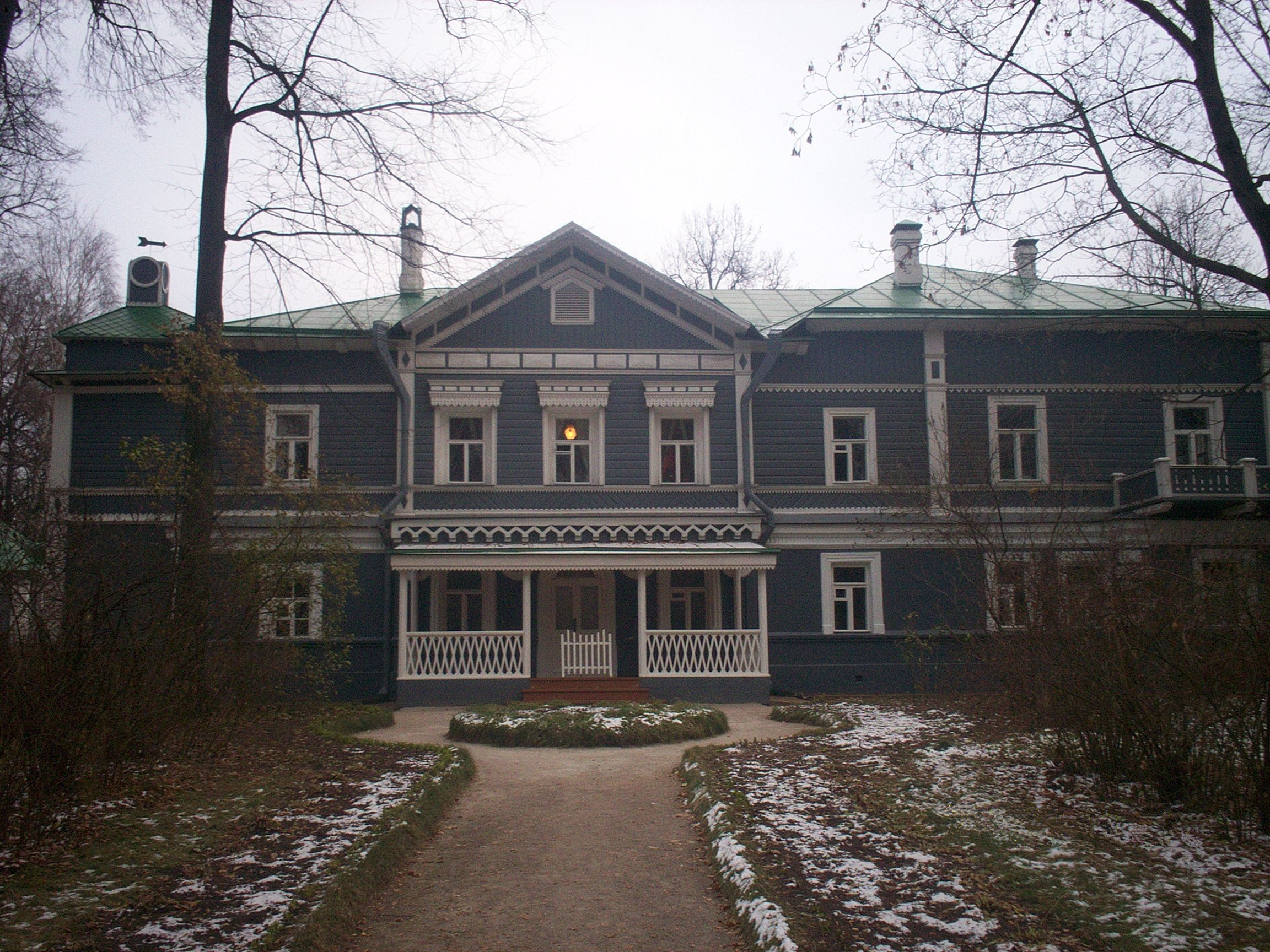 Pjotr Tšaikovskin kotimuseo Klinissä, Venäjällä